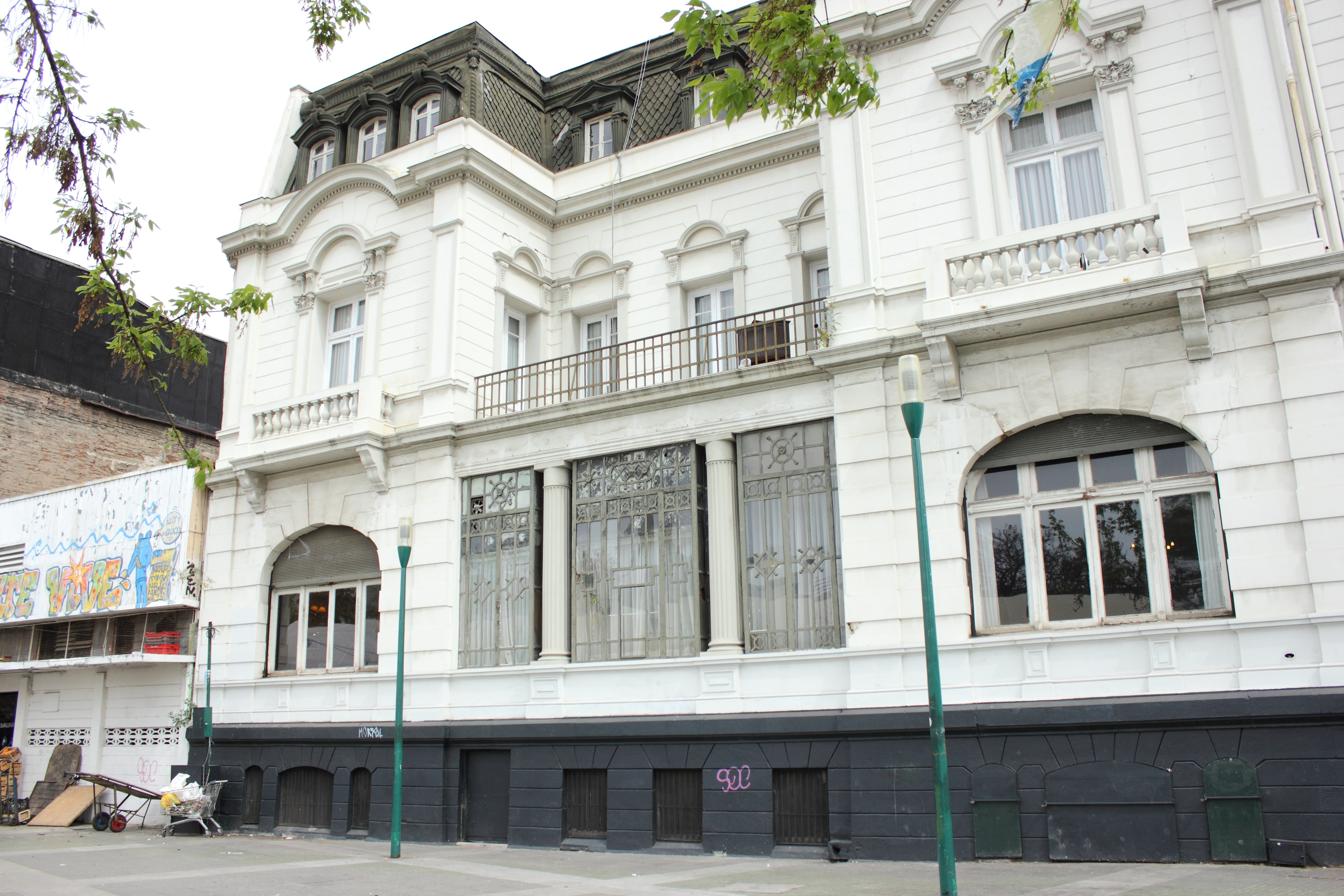 Palacio Ross This is a photo of a national monument in Chile: 618